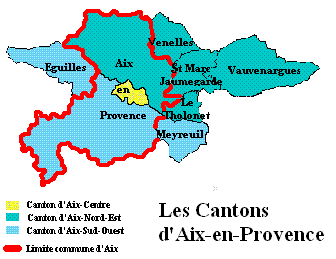 Découpage des Cantons d'Aix-en-Provence